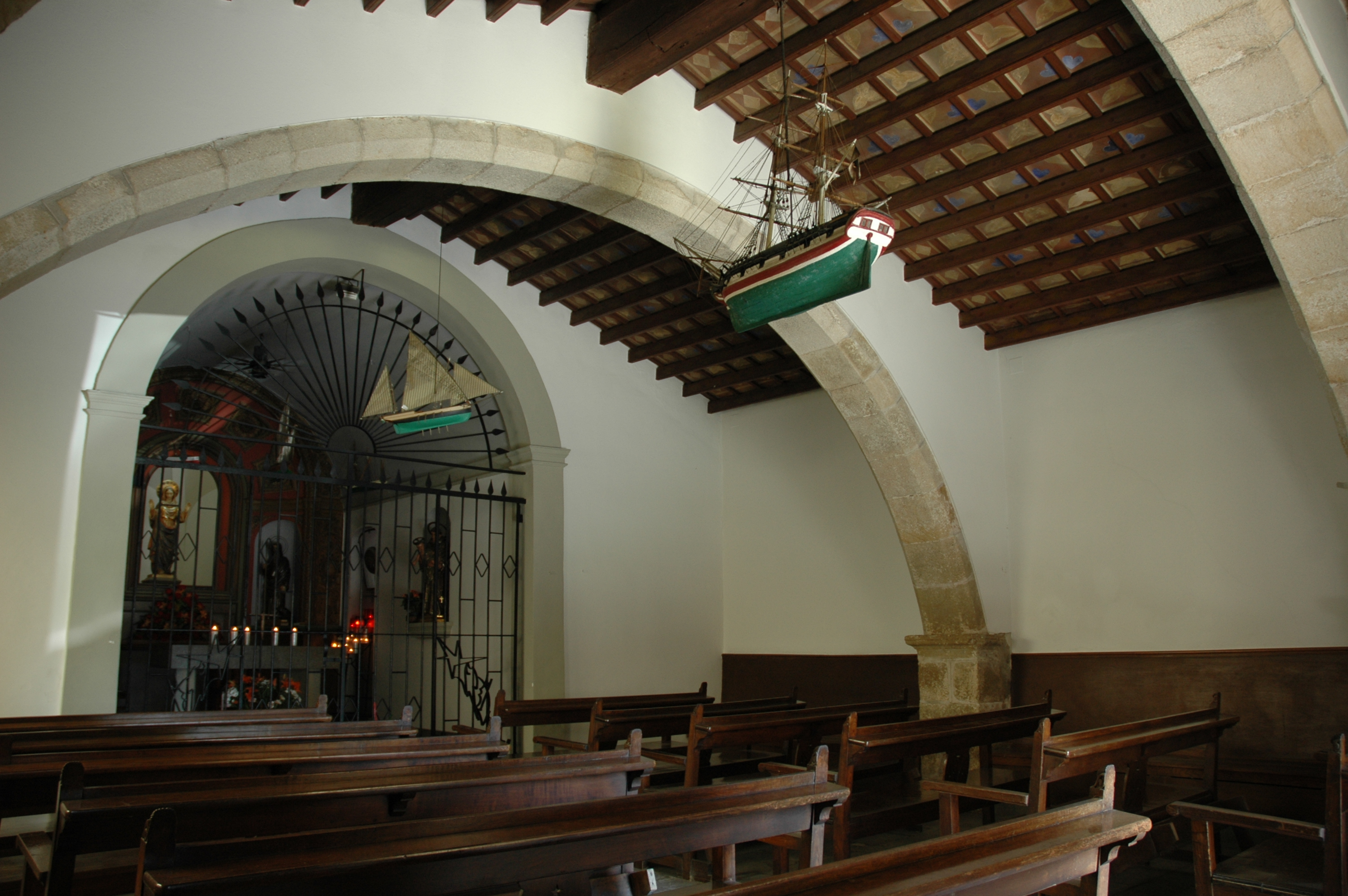 Blanes - Capella de l'Esperança - Interior